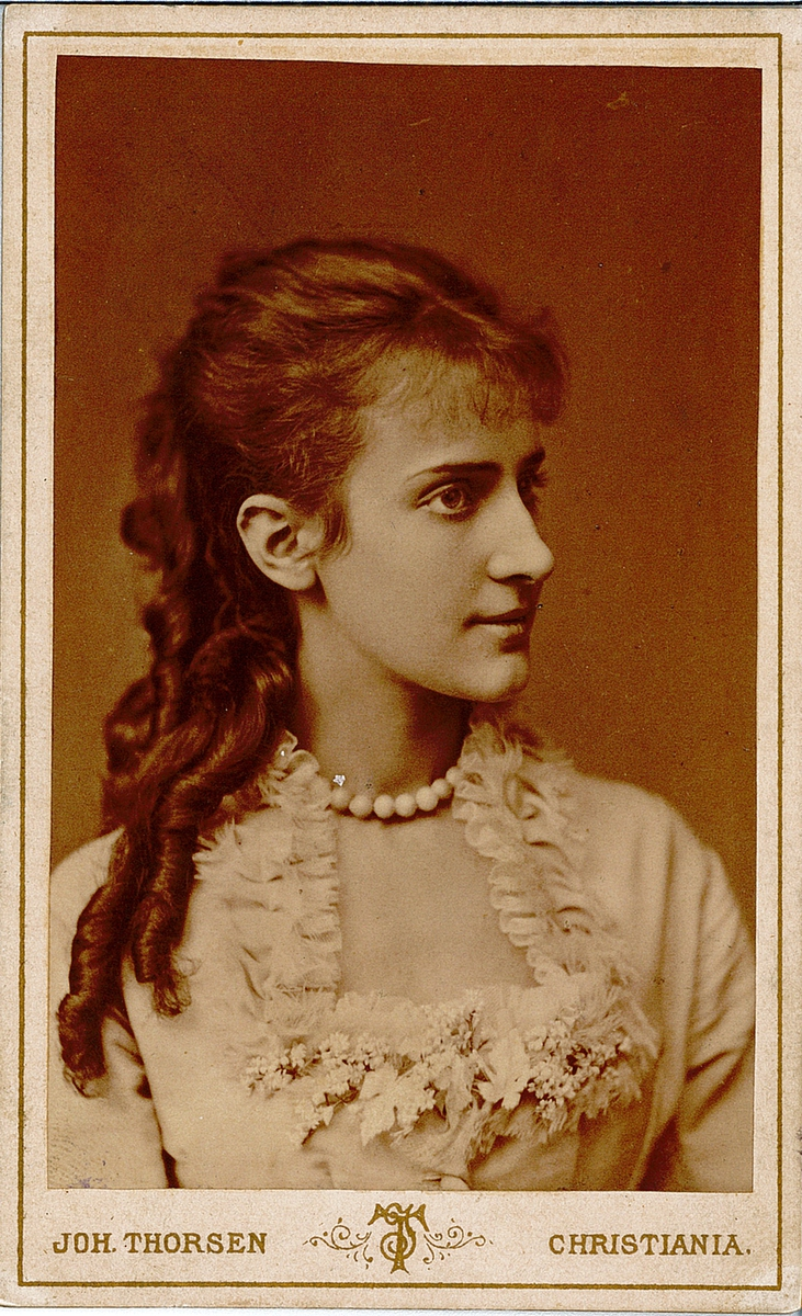 Forfatteren og skuespilleren Ågot Gjems Selmer som ung. Ågot Gjems giftet seg med distriktslege Alfred Selmer i 1883. Dette bildet tilhører Oslo Museum, og antas å være fra ca. 1880-1885.